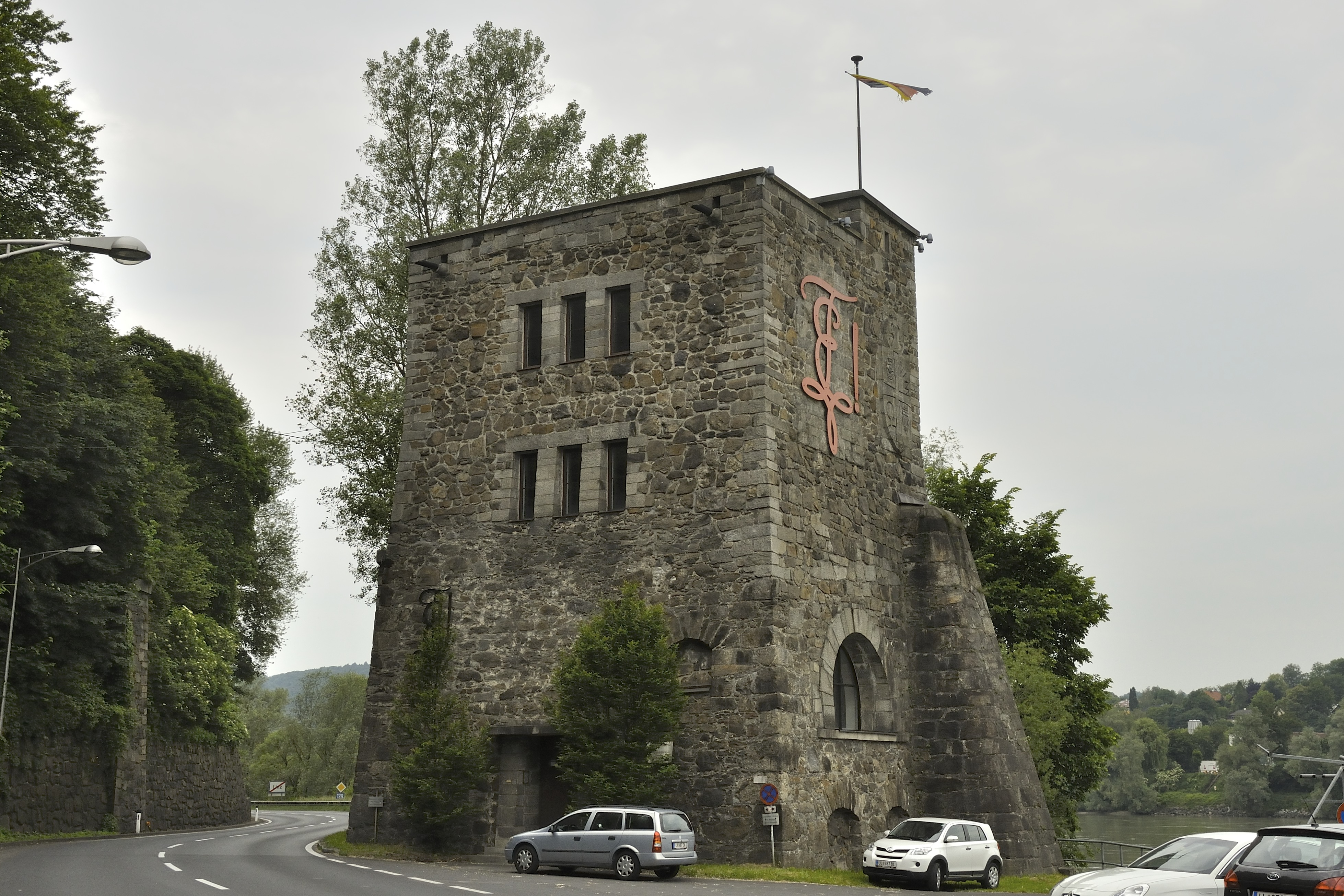 Sog. Anschlussturm, Klause Adelgunde mit Mauerstück